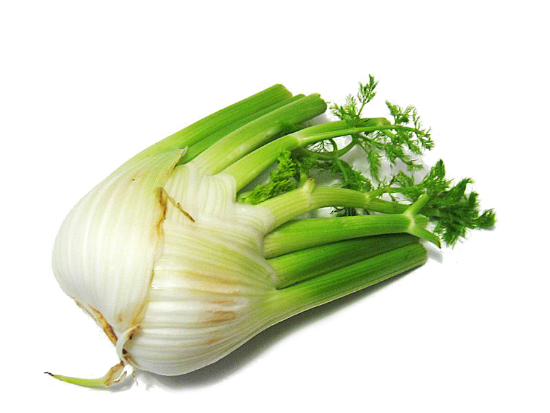 Fenchel-Knolle, Photo Dezember 2004 von Kristian Peters, GNU FDL